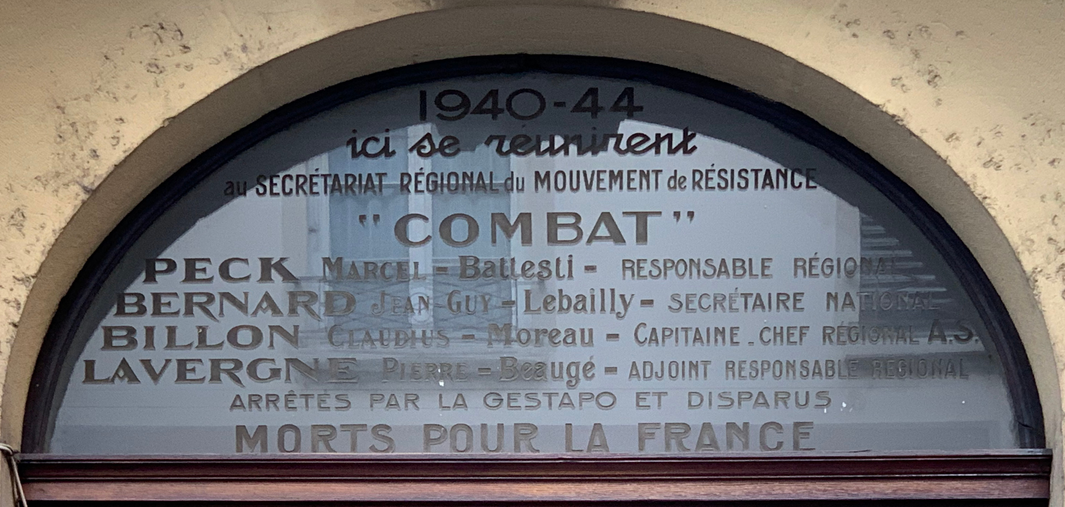 20 rue Vauban à Lyon - plaque commémorative mouvement Combat. recto in engraving: 1940-44 Ici se réunirent Au secrétariat régional du mouvement de résistance « COMBAT « PECK Marcel - Battesti - RESPONSABLE REGIONAL BERNARD Jean-Guy - Lebailly - SECRETAIRE NATIONAL BILLON Claudius - Moreau - CAPITAINE CHEF REGIONAL A.S LAVERGNE Pierre - Beaugé - ADJOINT RESPONSABLE REGIONAL ARRETES PAR LA GESTAPO ET DISPARUS MORTS POUR LA FRANCE